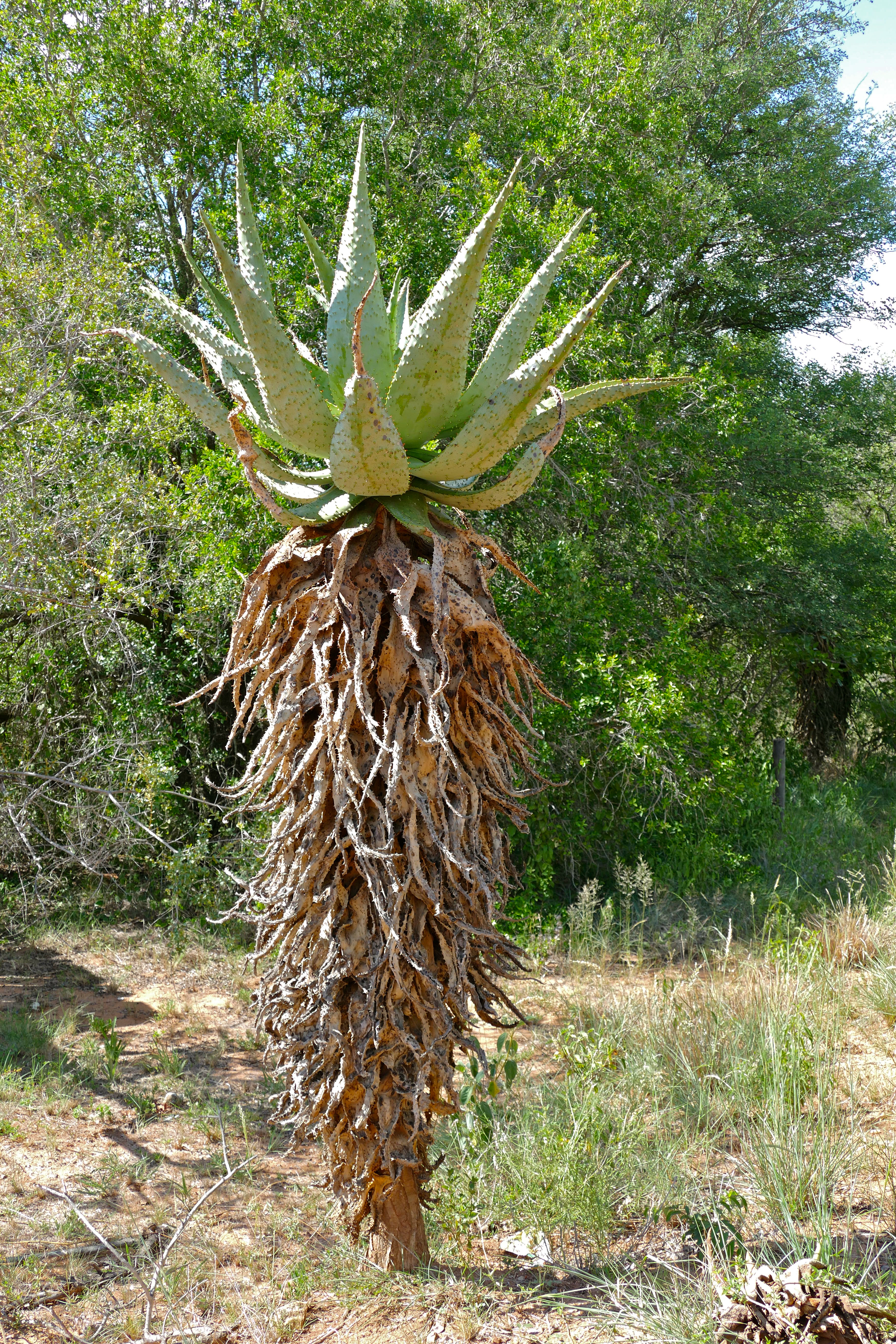 Berg-en-Dal Camp, Kruger NP, SOUTH AFRICA